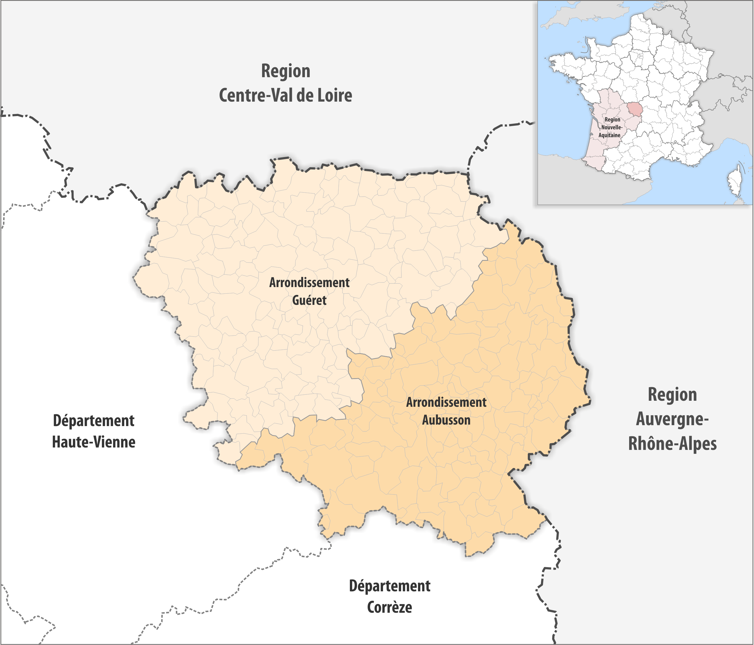 Gemeinden und Arrondissemente im Departement Creuse